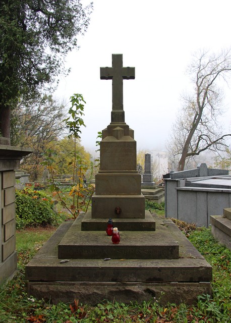 Гробівець родини Супінських.Личаківський цвинтар , поле № 71.